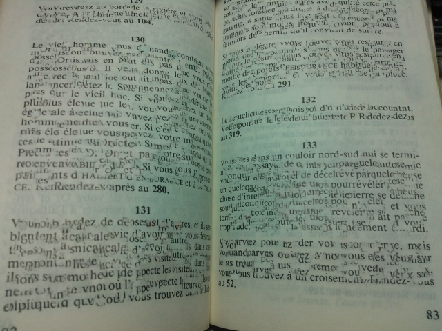 Illustration de paragraphes floutés et numérotés